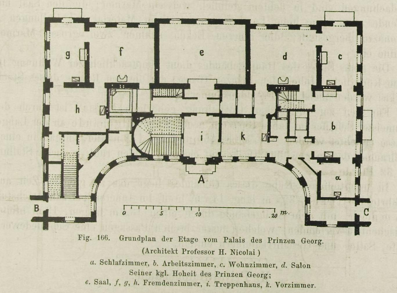 siehe Bildtext aus: Die Bauten, technischen und industriellen Anlagen von Dresden. Herausgegeben vom Sächs. Ingenieur- und Architekten-Verein und vom Dresdener Architekten-Verein. Meinhold, Dresden 1878